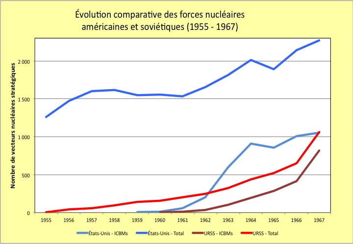 Le graphique présente le nombre total des lanceurs nucléaires stratégiques des États-Unis et de l'URSS et dans ce total le nombre de missiles intercontinentaux (ICBMs)